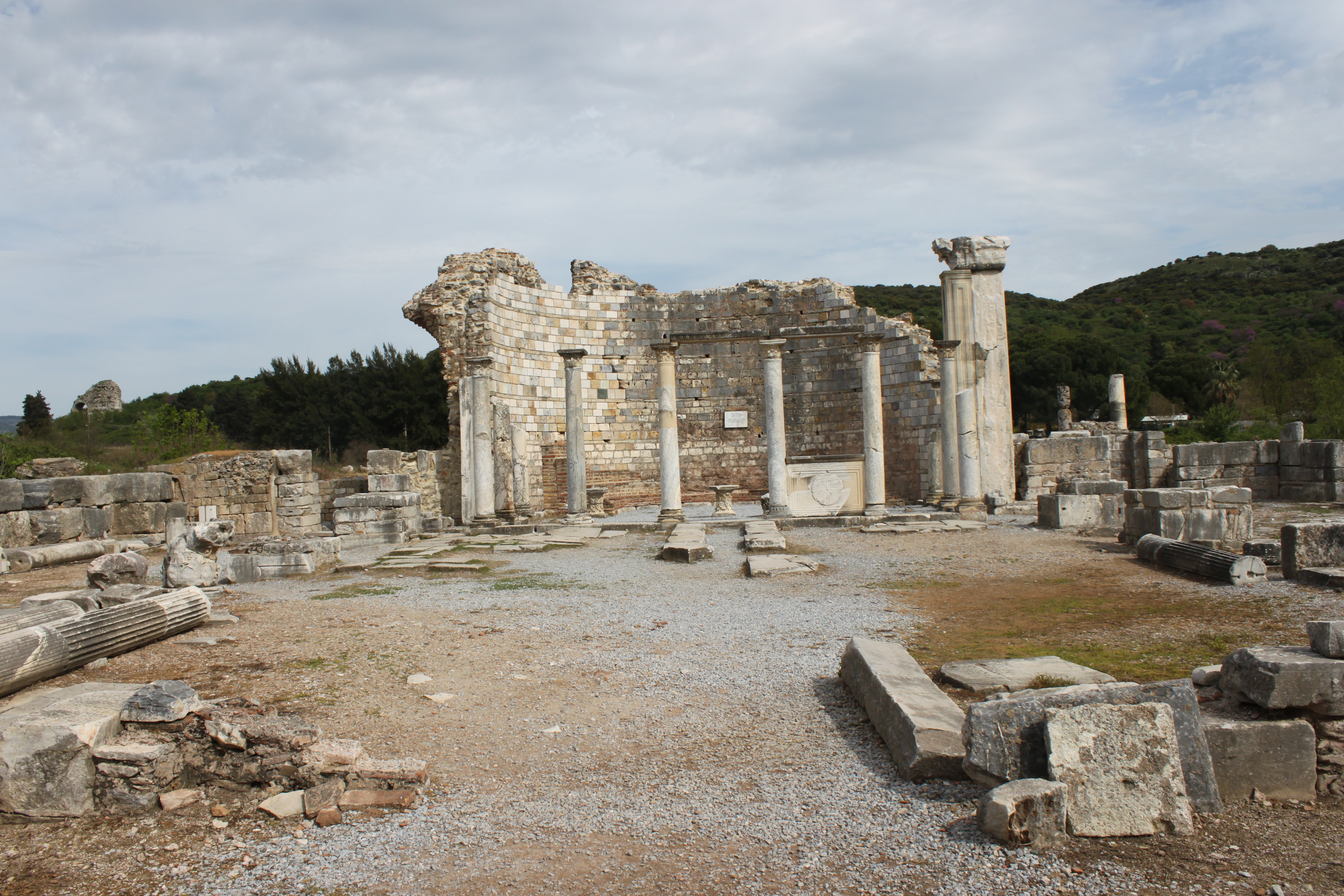 Ruinen der Marienkirche in Ephesos, Türkei